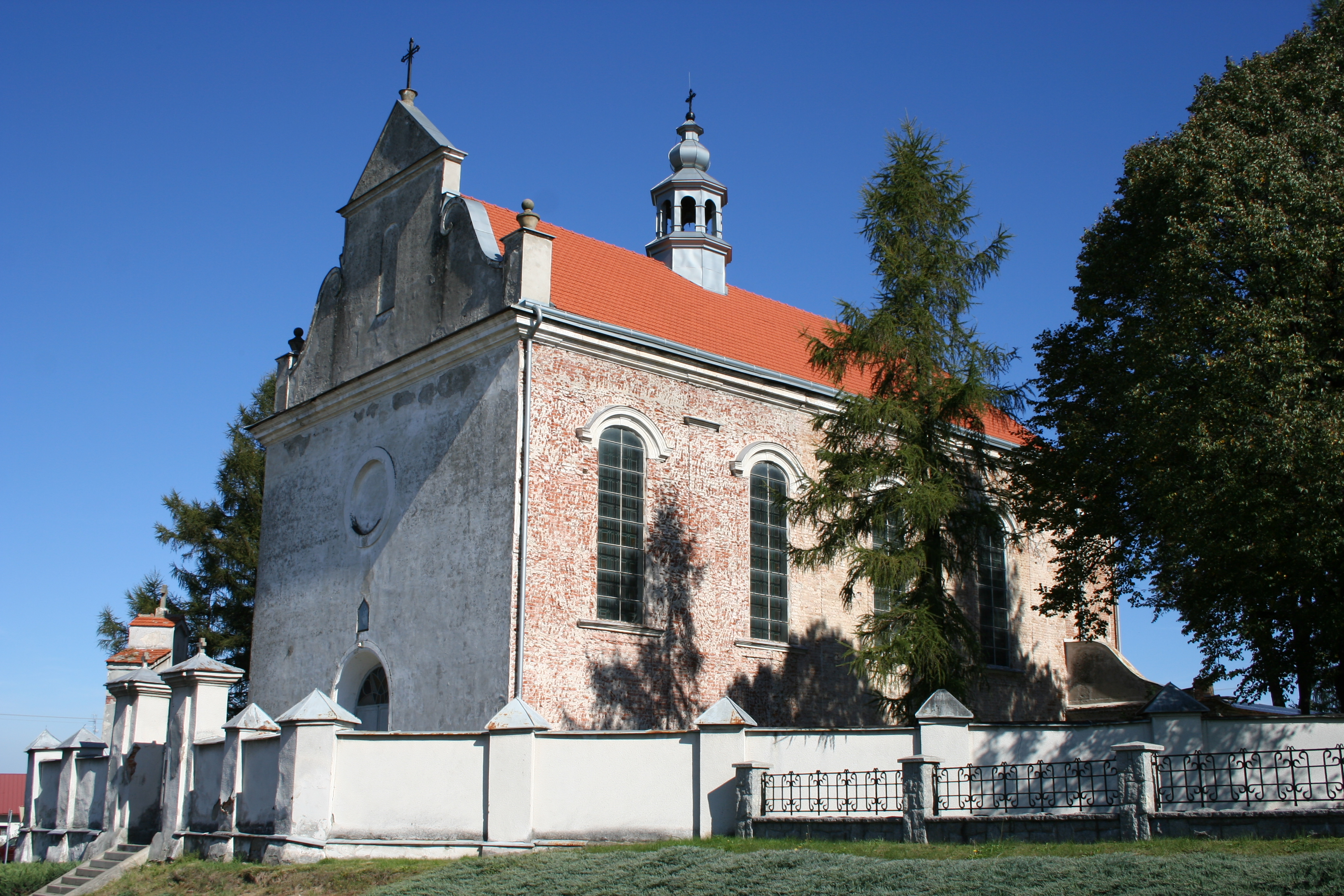 Krasne - zespół kościoła parafialnego pw. Wniebowzięcia NMP: Kościół parafialny pw. Wniebowzięcia NMP (zabytek nr A-1059 z 19.03.1980)